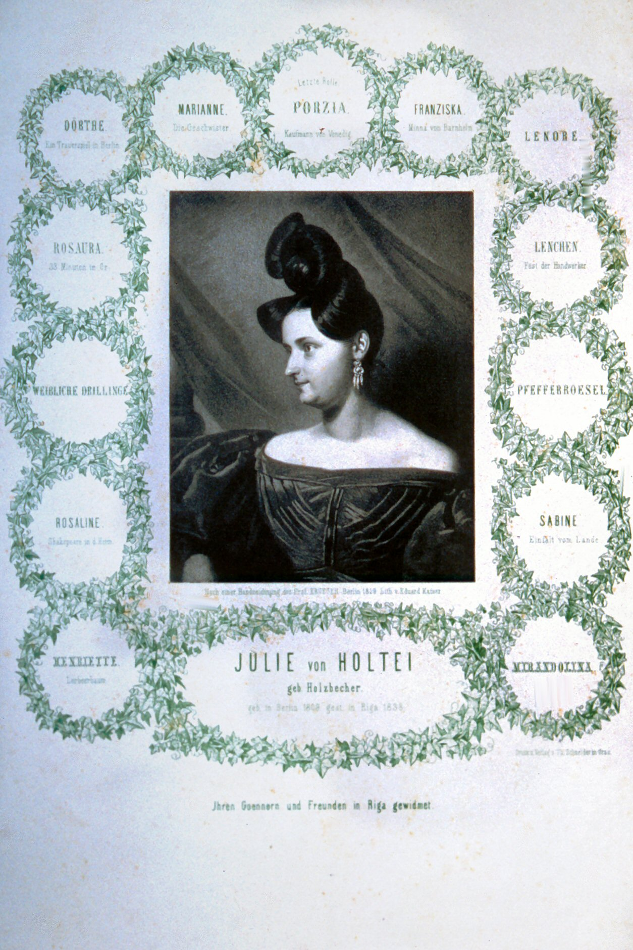 Julie von Holtei, geb Holzbecher (1808-1839), deutsche Schauspielerin, 2. Ehefrau des Dichters Holtei. Lithographie von Eduard Kaiser, nach Krüger, ca.1840.1